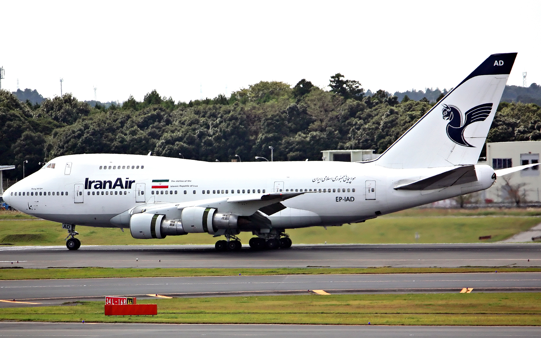 Boeing:747-SP86 SN:21758/371